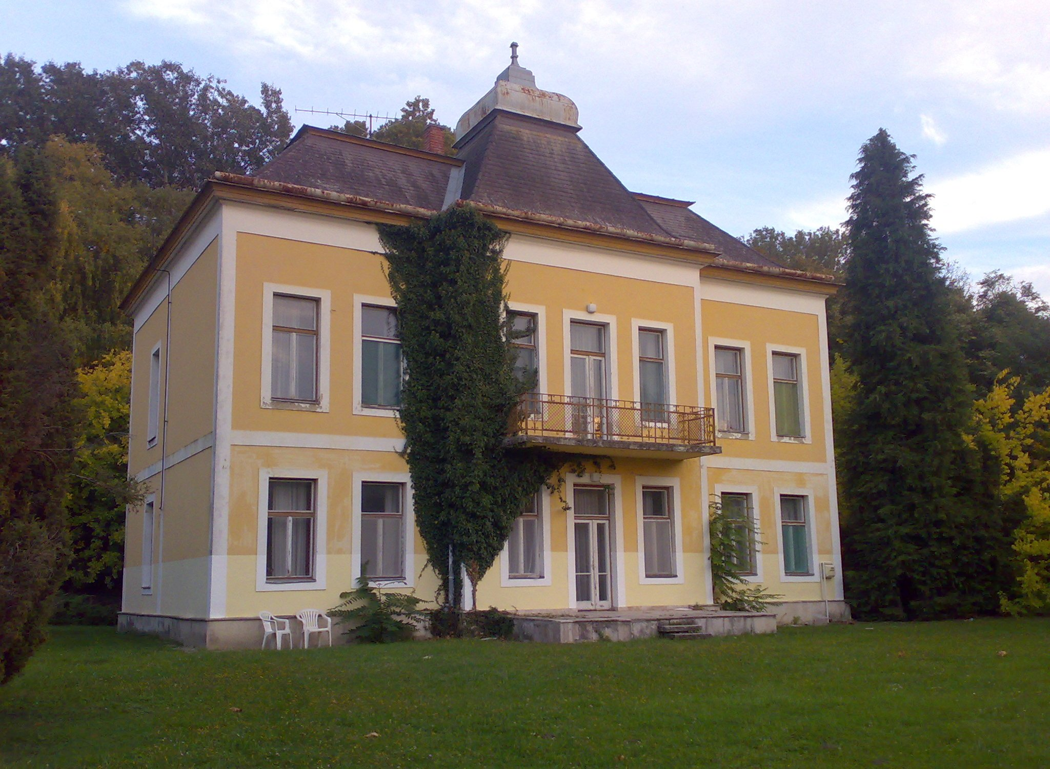 Pártüdülő